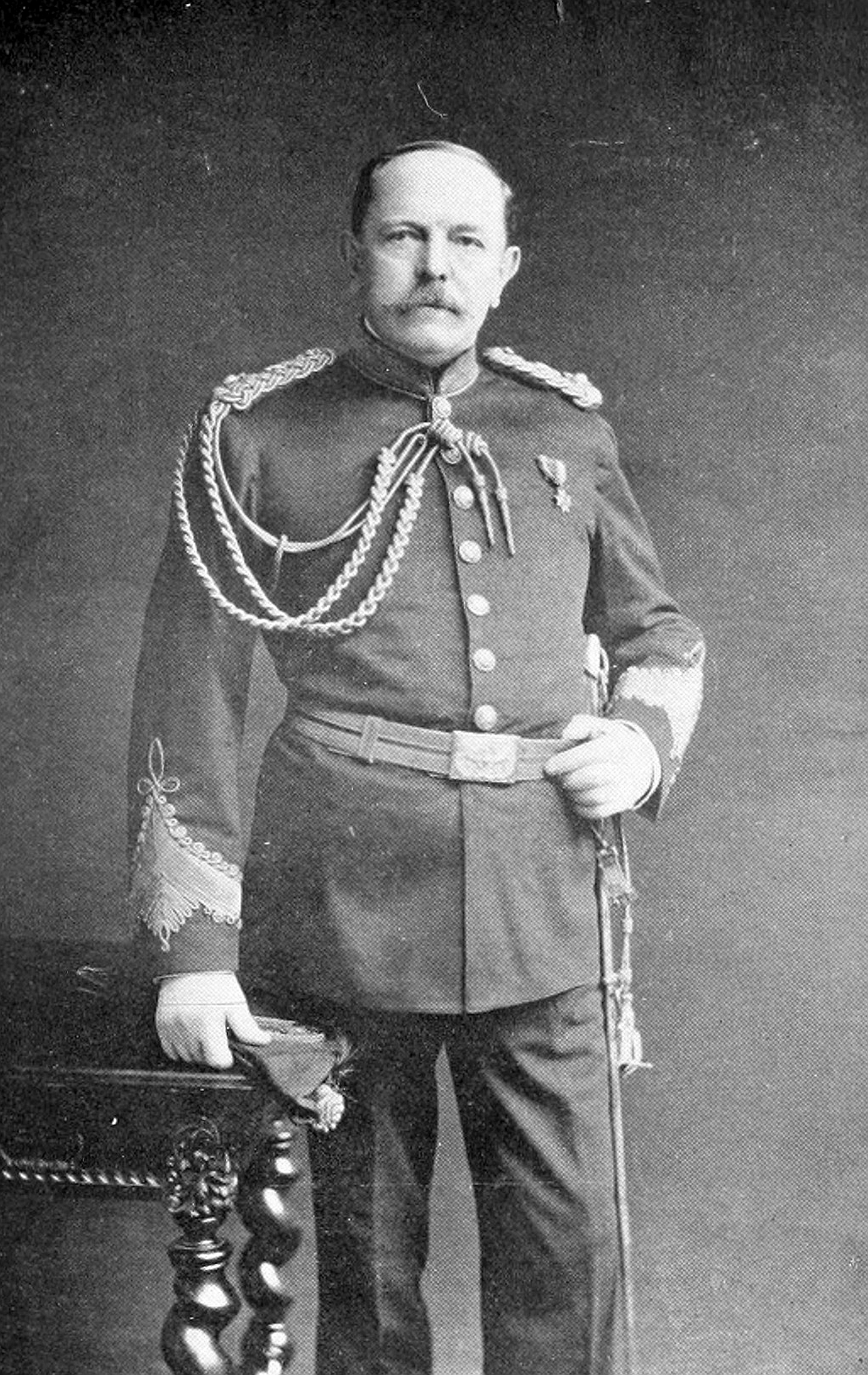 George Croghan Reid